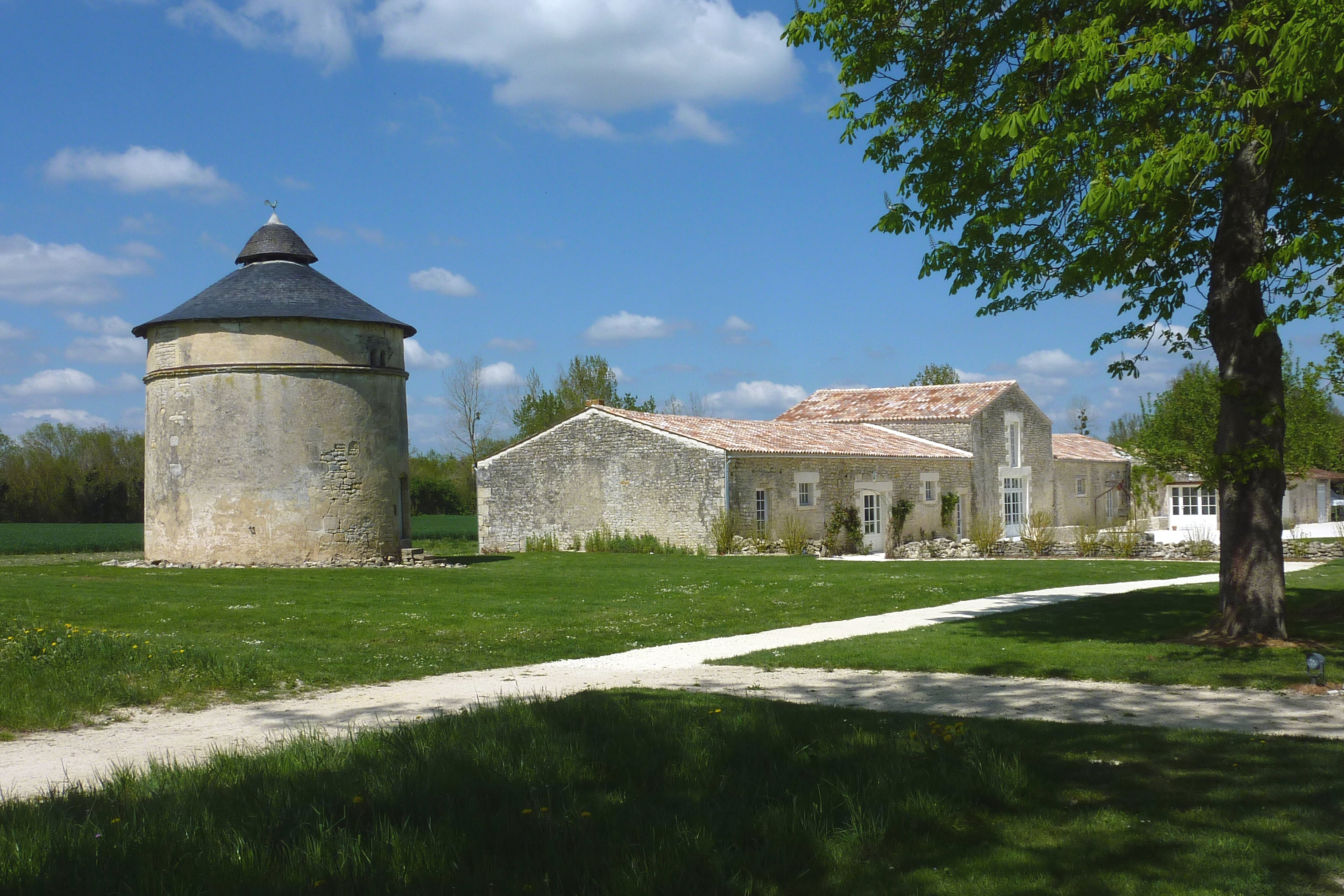 Pigeonnier et dépendances de l'abbaye cistercienne de la Grâce-Dieu Benon Charente-Maritime France